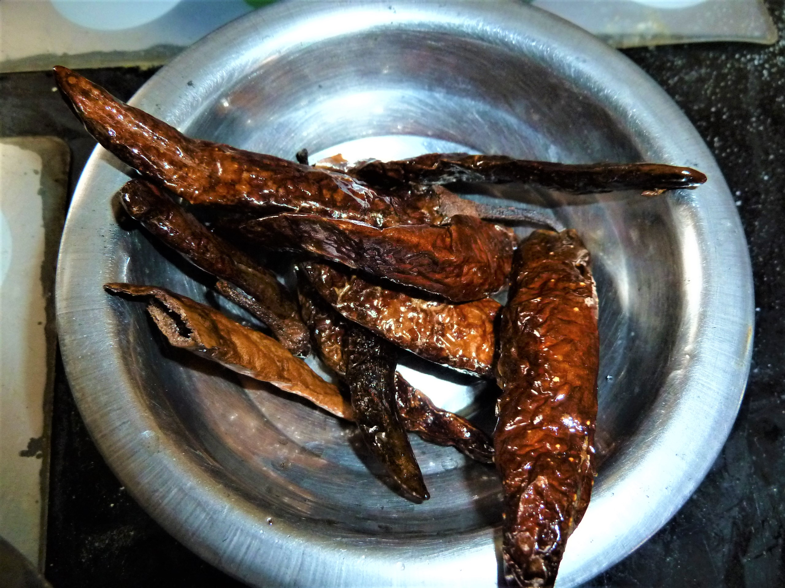 ఊరుమిరప కాయలు